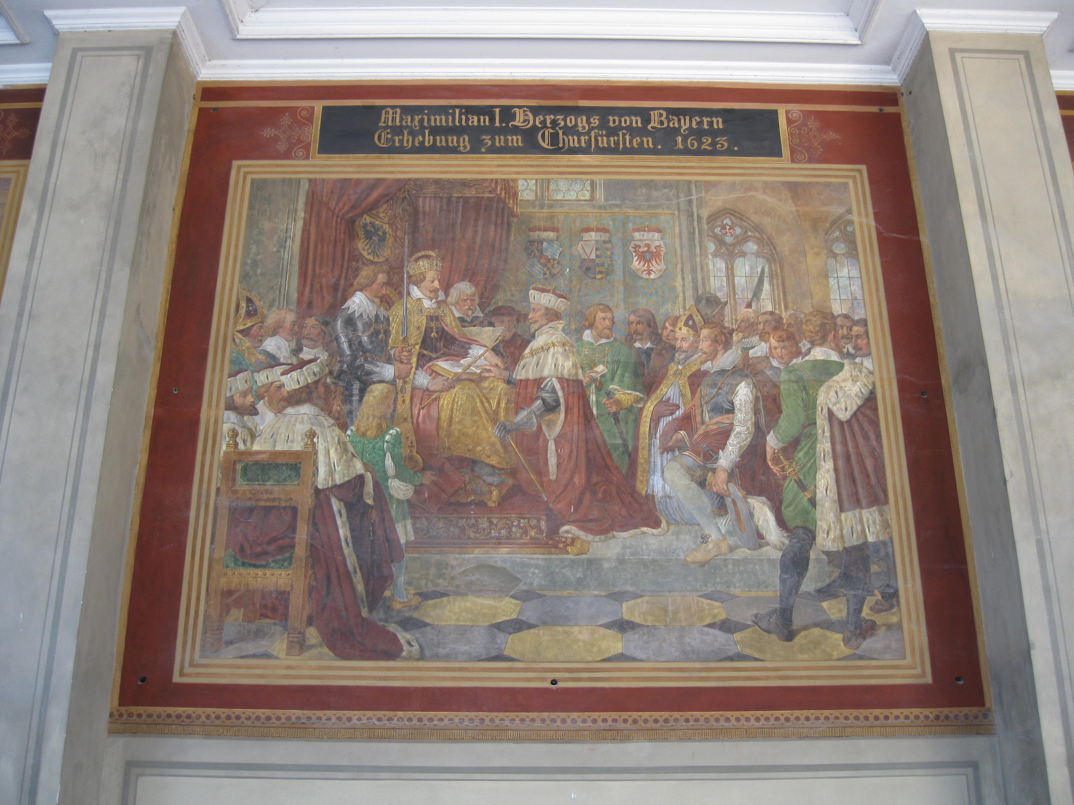 Wandgemälde im Münchener Hofgarten mit Szenen aus der bayerischen Geschichte. „Maximilian I. wird zur Belohnung für seine namentlich in der Schlacht am weißen Berge geleisteten Dienste, an der Stelle des abgesetzten Friedrich von der Pfalz, am 23. Februar 1623 von Kaiser Ferdinand II. mit der Churwürde belehnt (1623)“ von Adam Eberle.